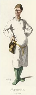 Dessin de Maurice Sand, mort en 1889, du savetier pauvre pour illustrer la Farce des deux savetiers, taille réelle : 41 X 61 cm. Picture from Maurice Sand (son of George Sand), dead in 1889, for the French play : Farce des deux savetiers, real size : 41 X 61 cm.